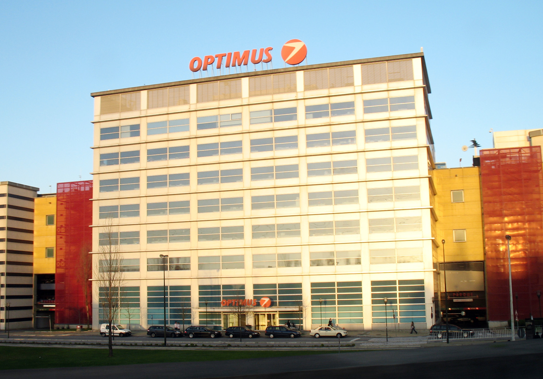 Edifício da Optimus (Matosinhos).